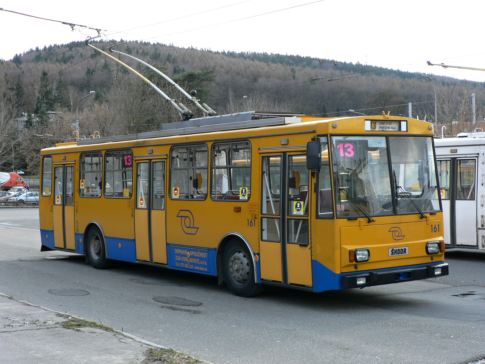 Trolejbus 14Tr 10/6 na obratišti Sportovní hala